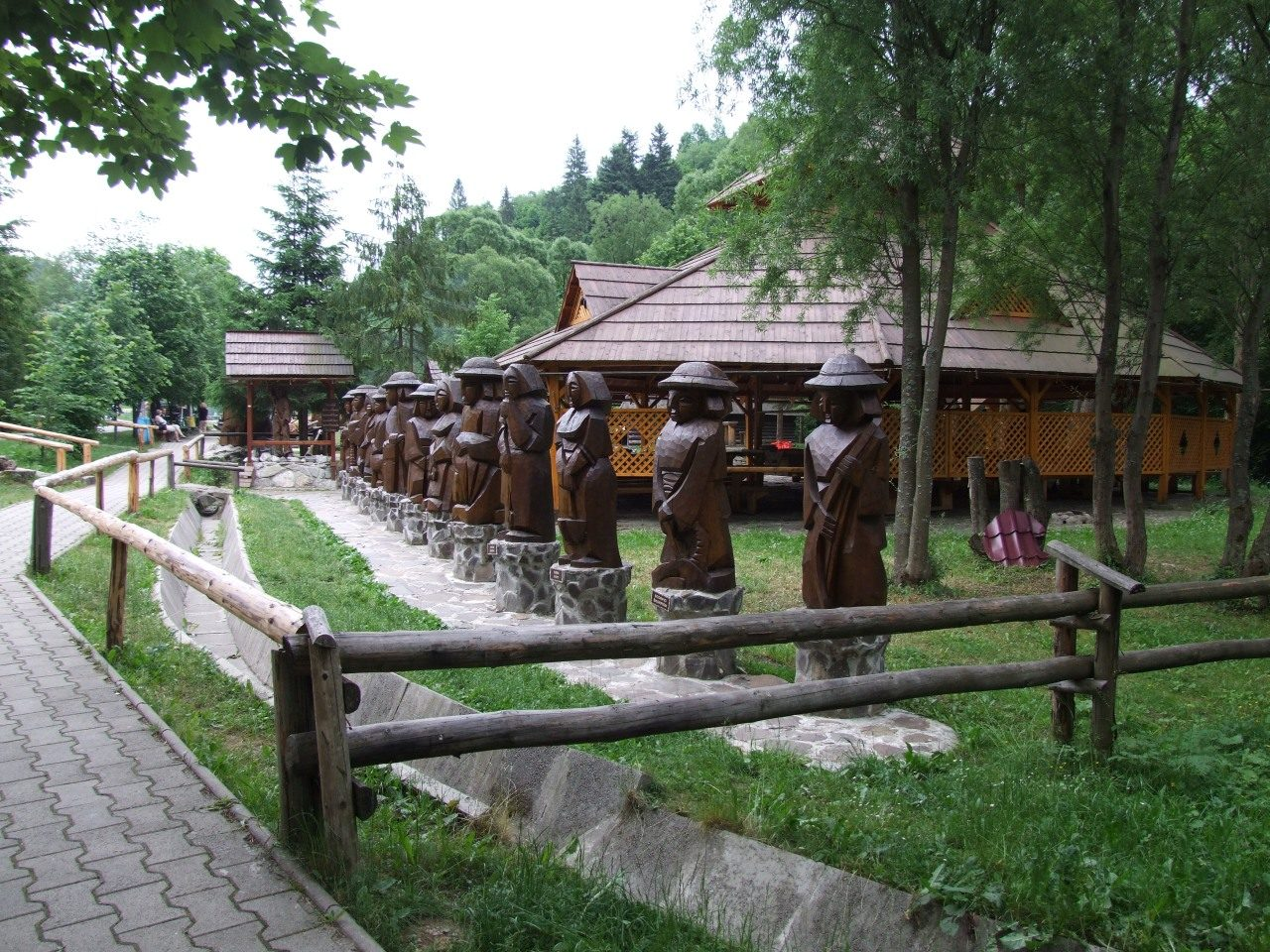 Leśnica koło Szczawnicy